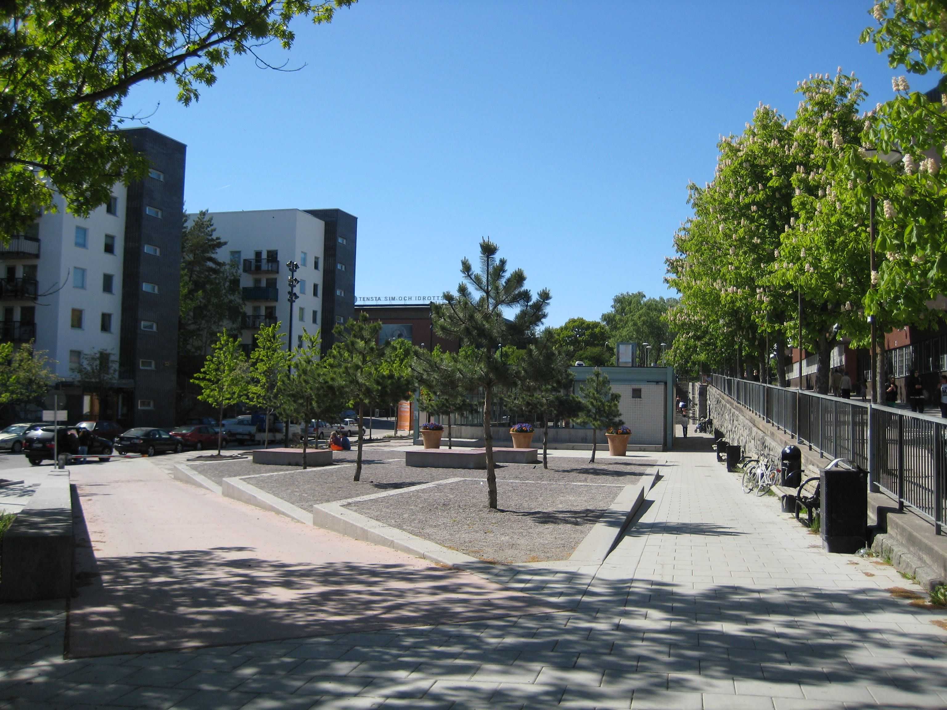 Tensta tunnelbaneuppgång sommaren 2008.